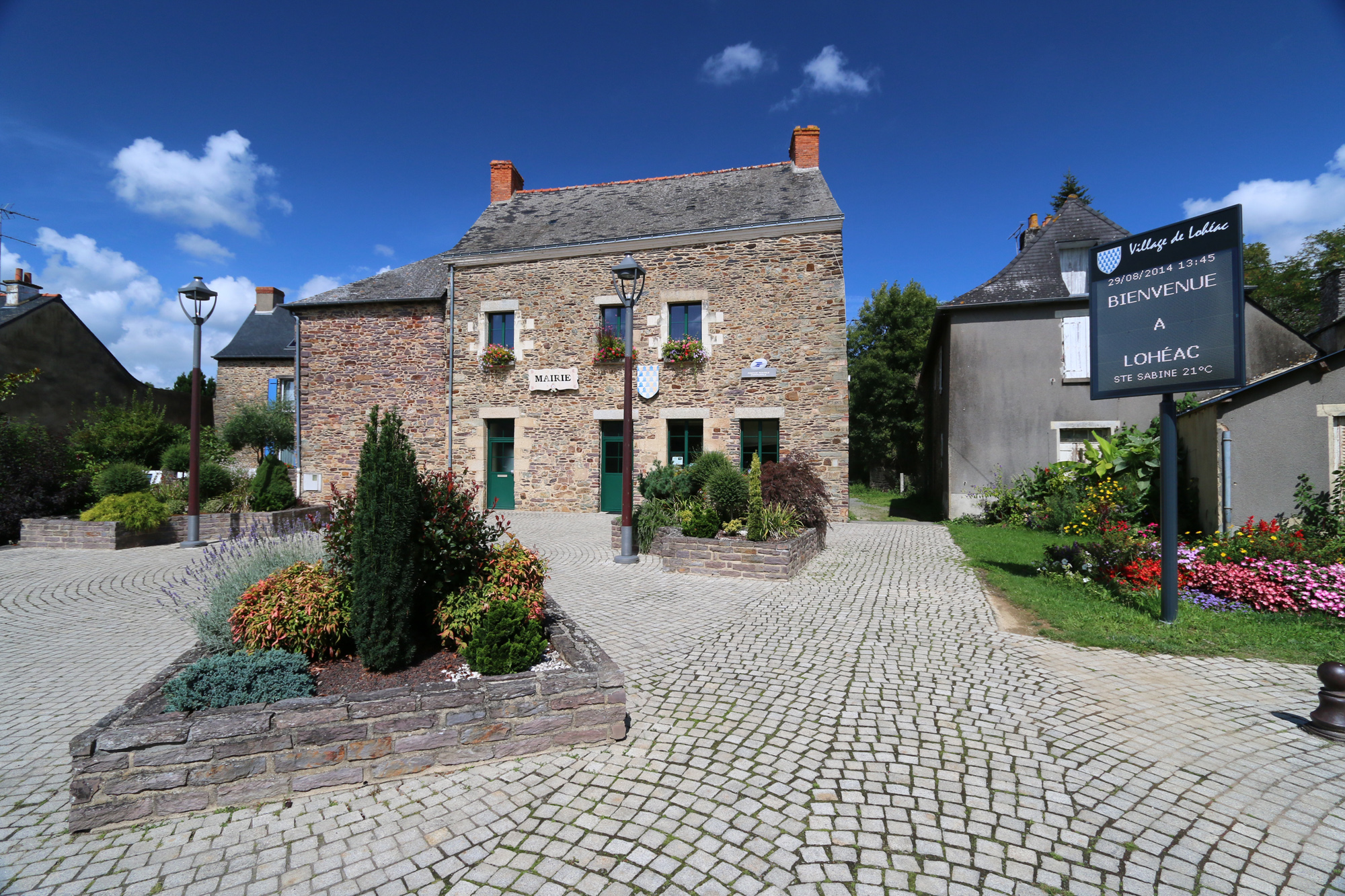 Mairie de Lohéac